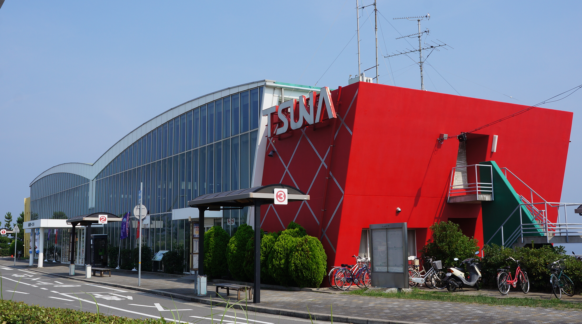 津名港ターミナルビル